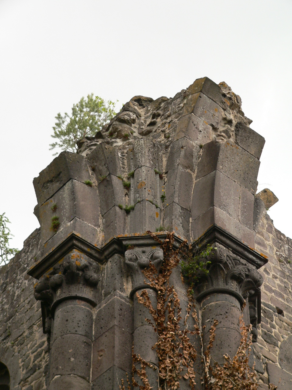 Kapitelle der Vierung Kloster Arnsburg bei Lich, Hessen, Germany